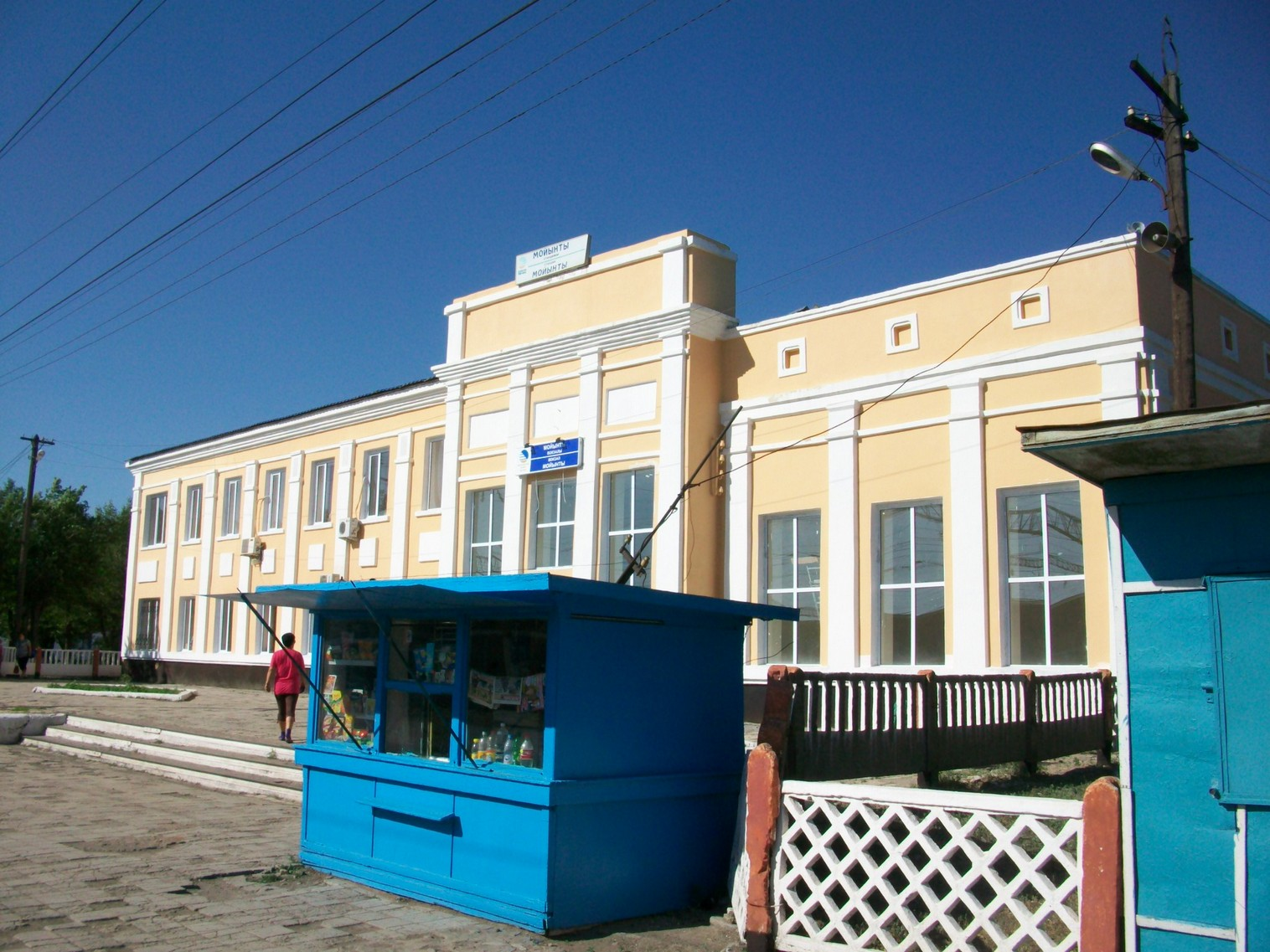 Железнодорожная станция Моинты